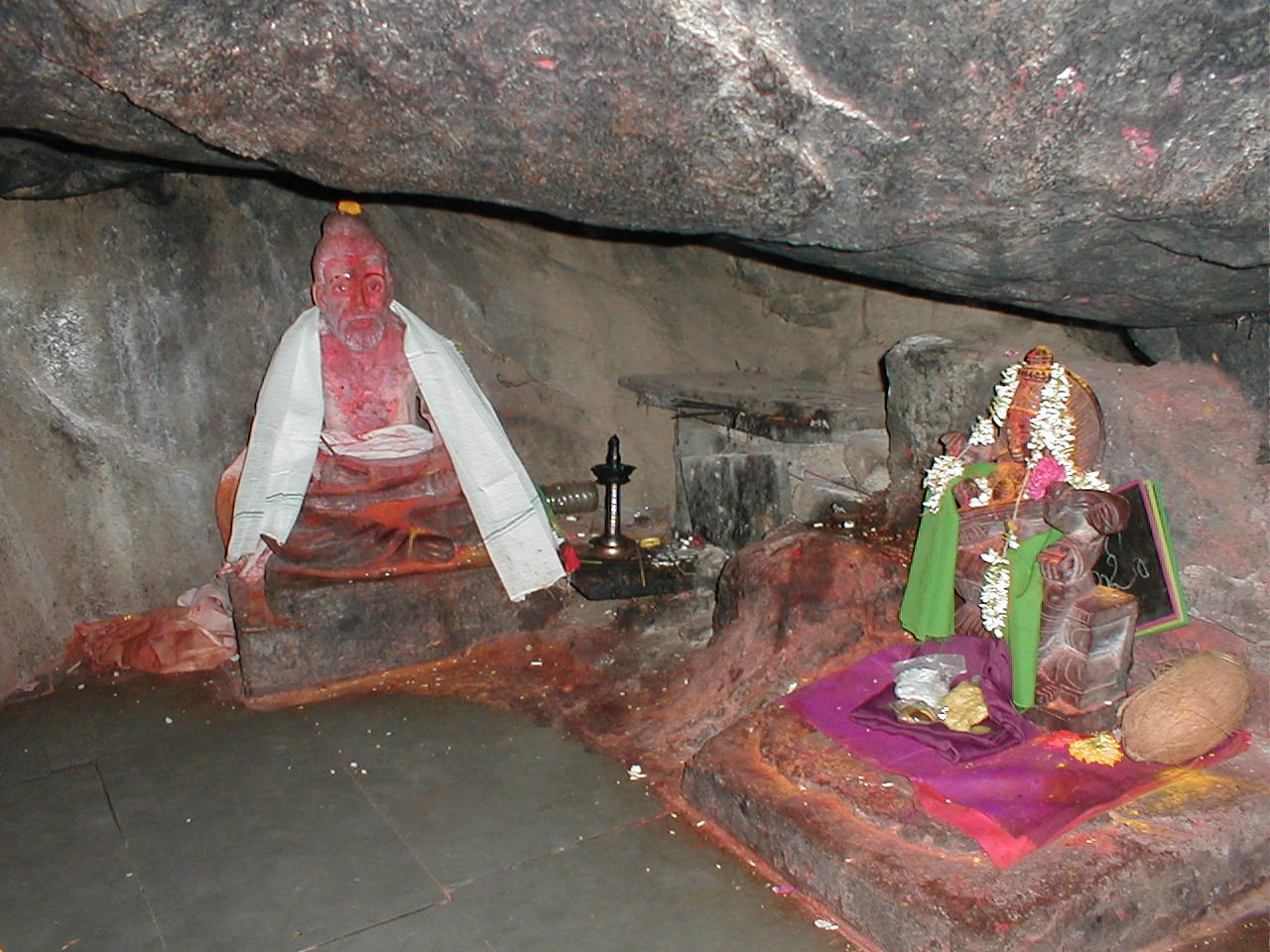 Vyasa Guha of Basara Saraswathi Temple